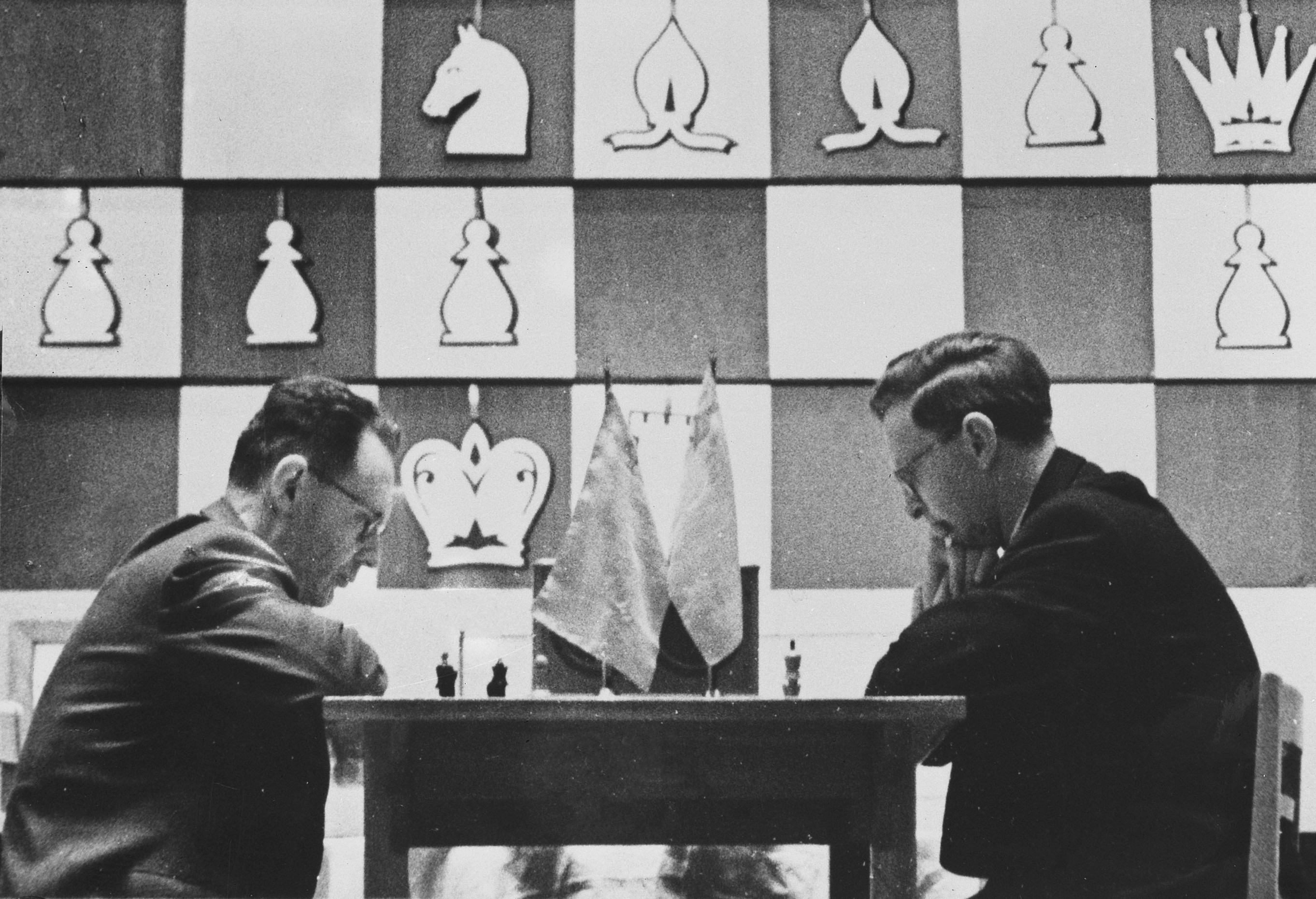 Collectie / Archief : Fotocollectie Anefo Reportage / Serie : [ onbekend ] Beschrijving : Wereldkampioenschap schaken Moskou, rechts Smyslow, links Botvinnik (ook bekend als Botwinnik) Datum : 19 april 1957 Locatie : Moskou Trefwoorden : SCHAKEN, WERELDKAMPIOENSCHAP Persoonsnaam : Botvinnik, Mikhail, Botwinnik, Mikhail Fotograaf : Fotograaf Onbekend / Anefo Auteursrechthebbende : Nationaal Archief Materiaalsoort : Glasnegatief Nummer archiefinventaris : bekijk toegang 2.24.01.09 Bestanddeelnummer : 908-5117